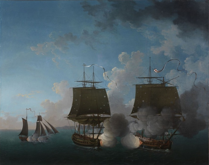 Le 22 août 1778, au large de Saint-Domingue, la frégate française la Concorde attaque la frégate anglaise HMS Minerve. Un combat acharné s'engage. La Minerve, démâtée, amène son pavillon et doit se laisser remorquer par la Concorde jusqu'au Cap Français.